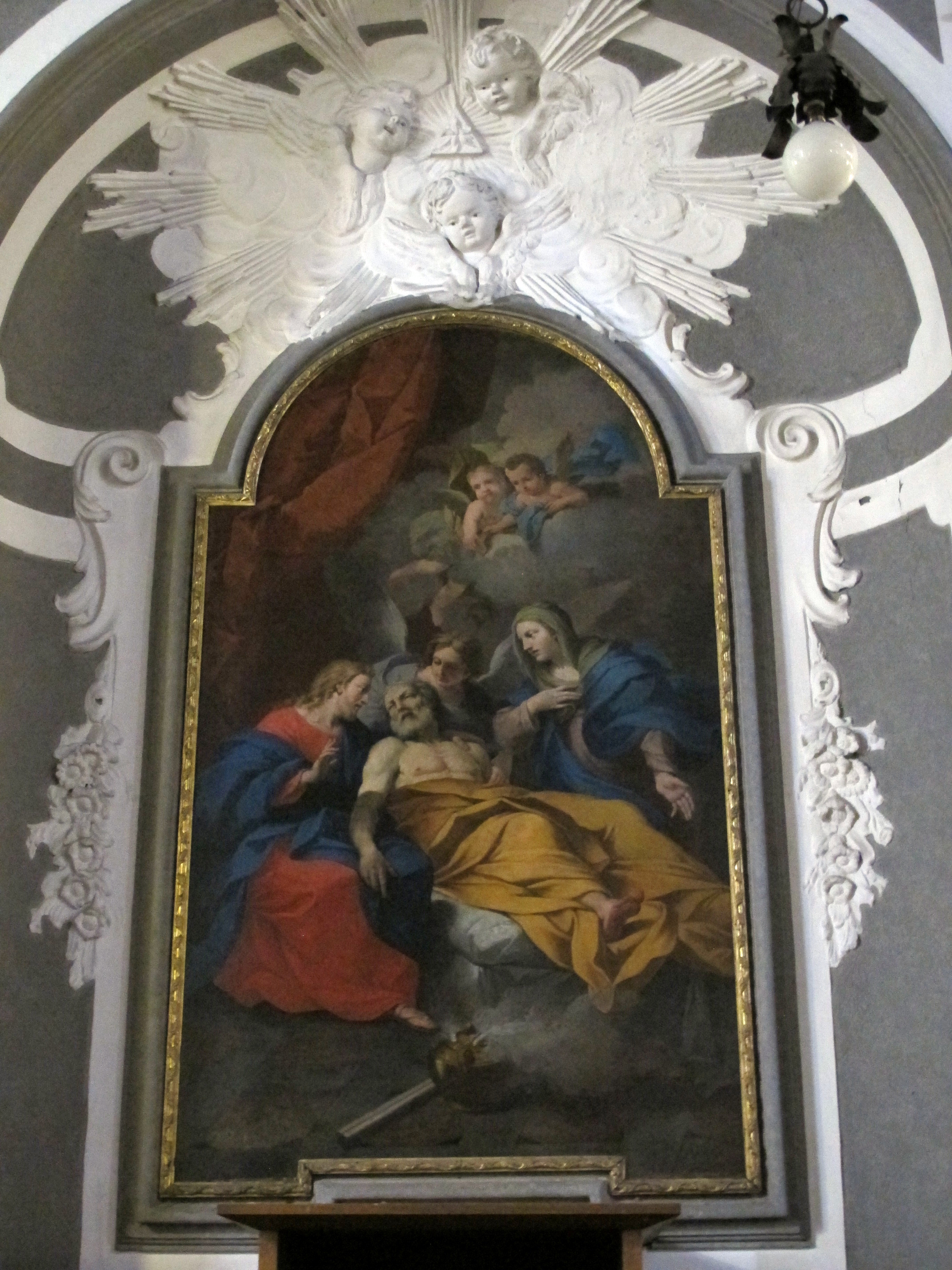 Santa Maria del Soccorso - Prato